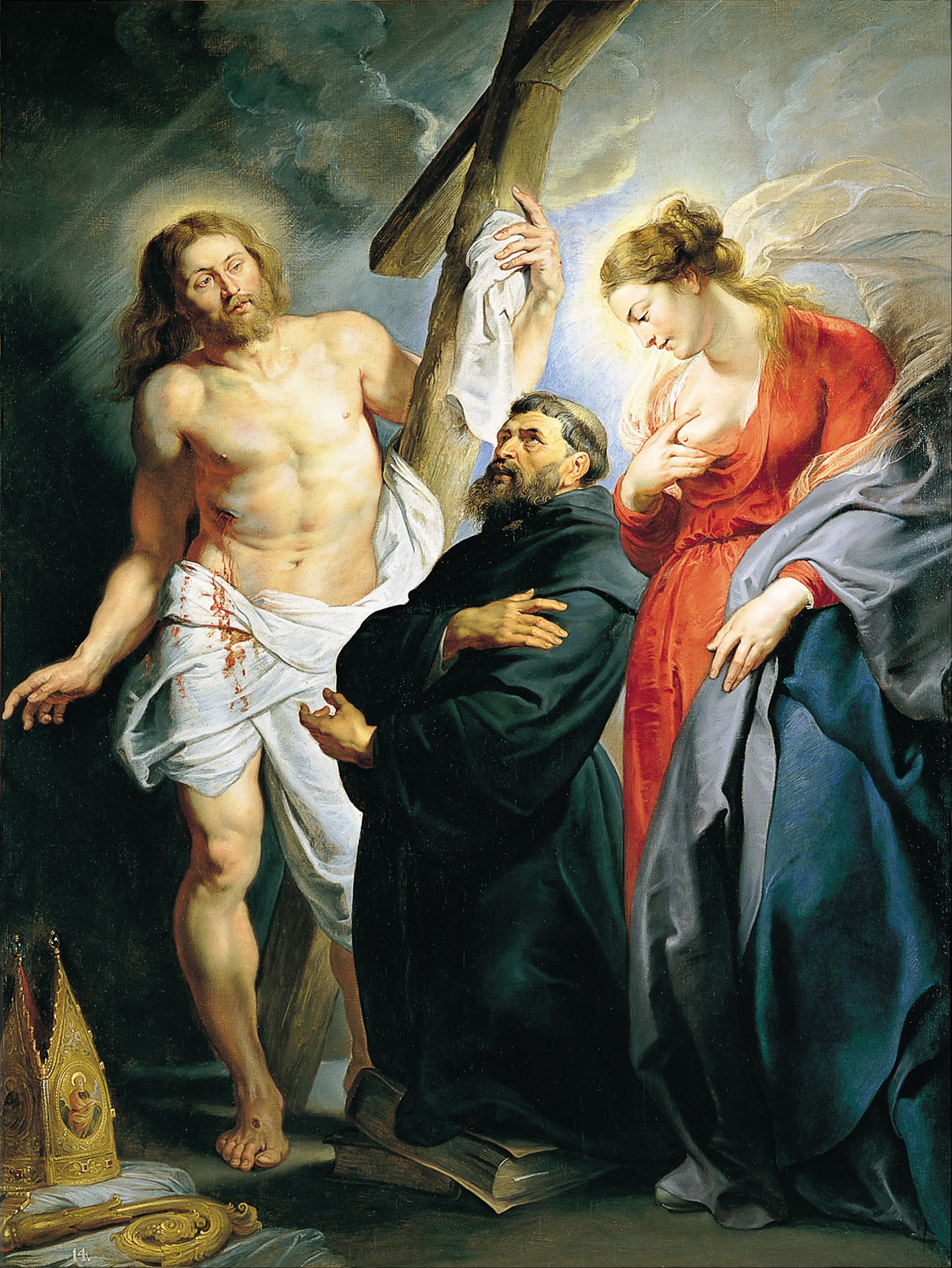 El lienzo representa a San Agustín de Hipona, uno de los Padres de la Iglesia, entre Jesucristo y su madre, la Virgen María.